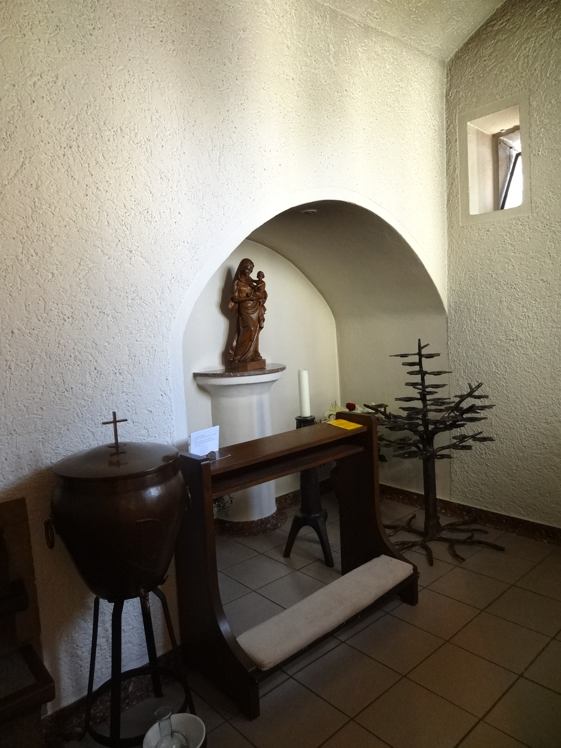 St. Marien (Großen-Buseck)